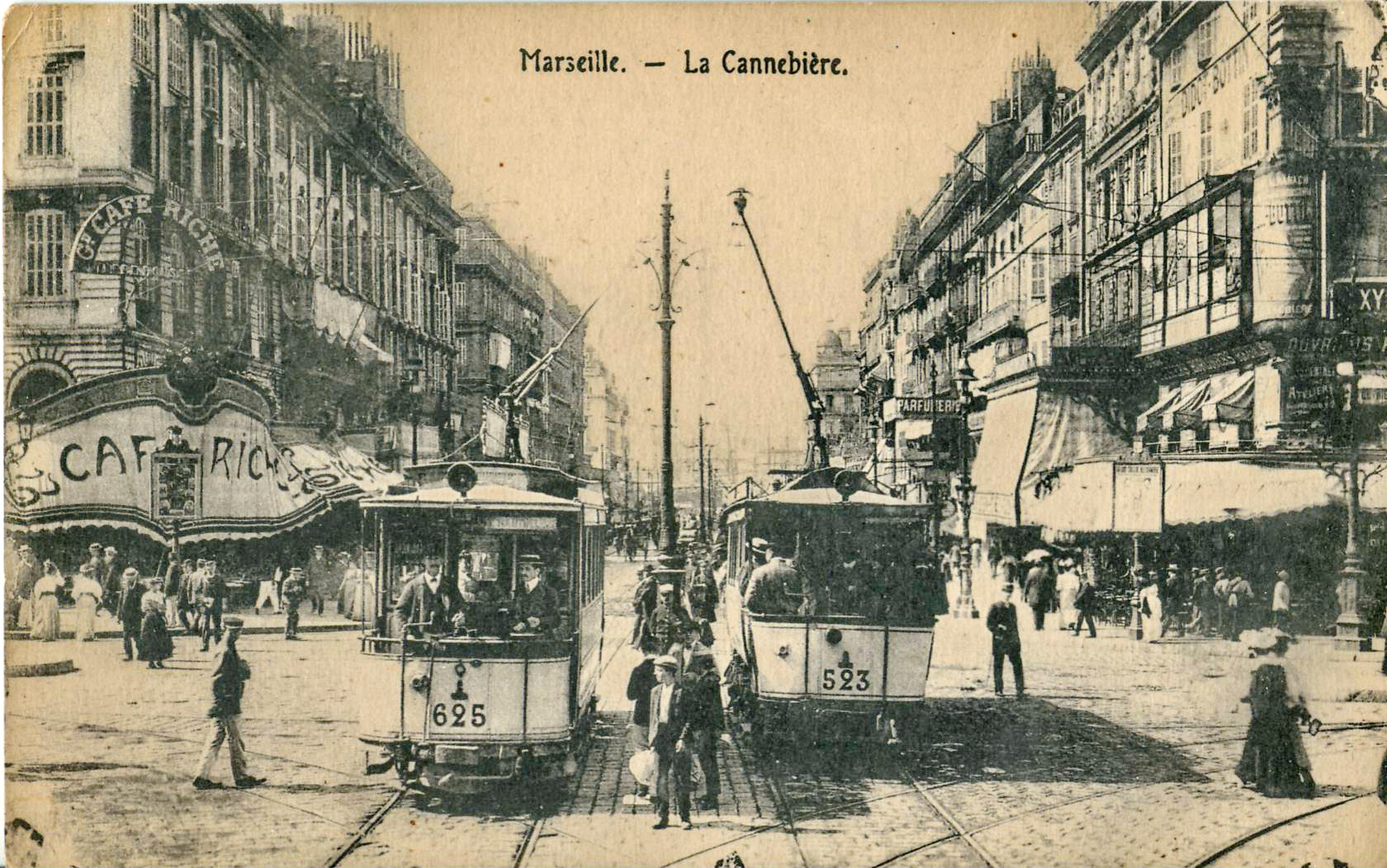 Carte postale ancienne sans mention d'éditeur : MARSEILLE - La Cannebière